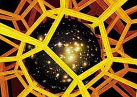 Illustration (erstellt mit Photoshop unter Verwendung einer Hubble-Deep-Field-Aufnahme)